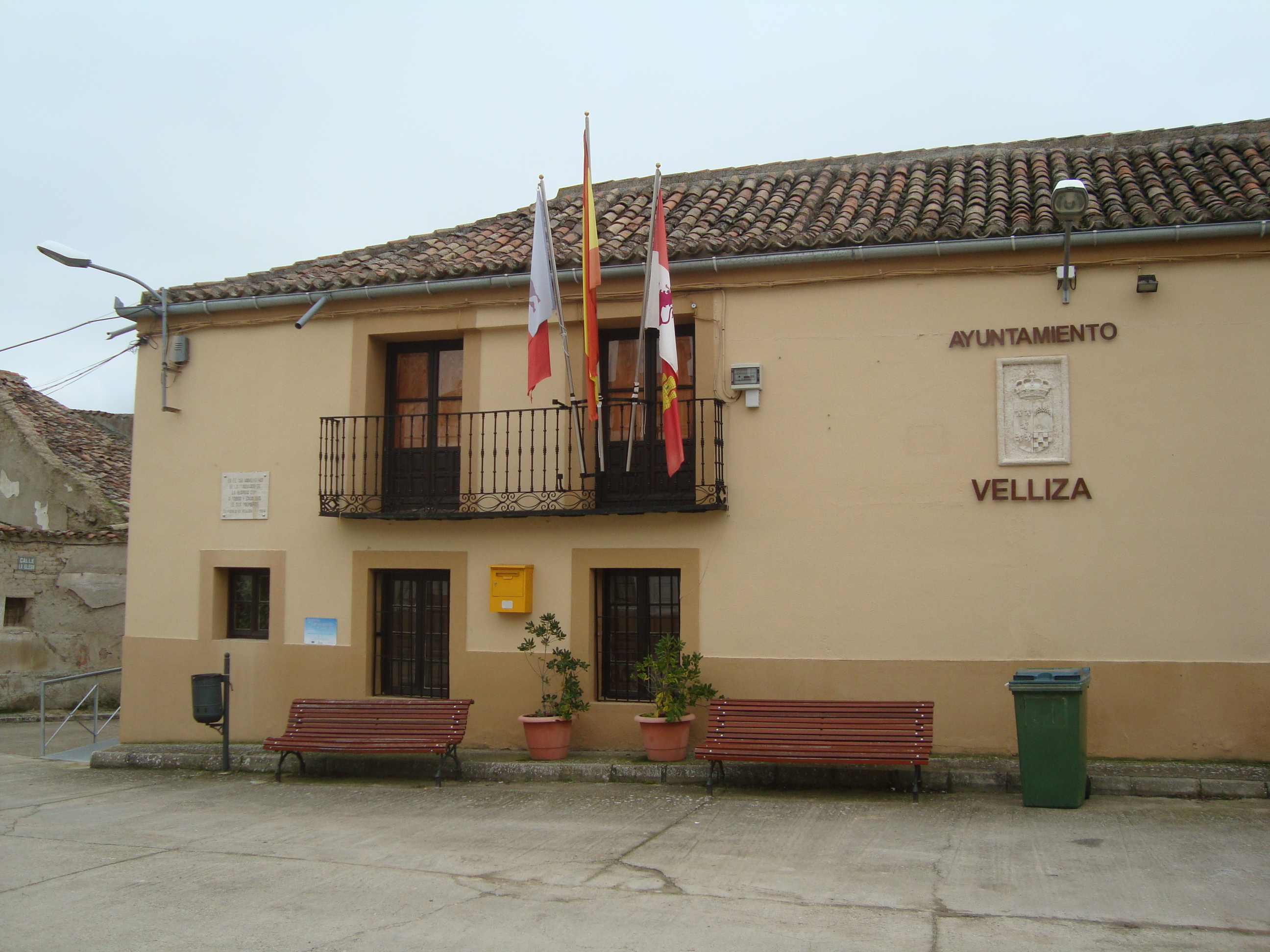 Casa consistorial de Velliza (Valladolid).